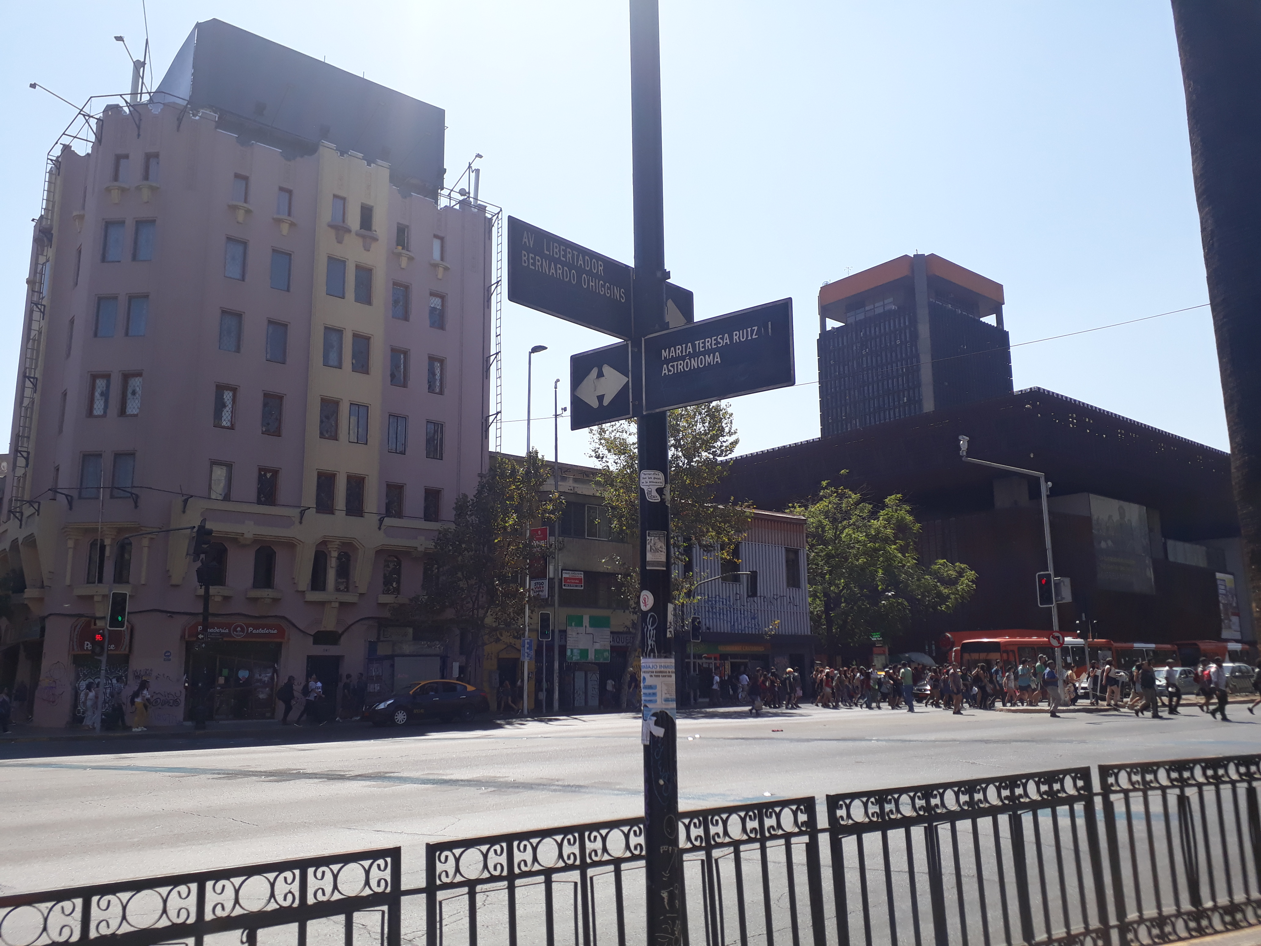 Intervención urbana para el día de la mujer 2019 en Santiago. Se cambia el nombre de Avenida Portugal por el de la astrónoma chilena María Teresa Ruiz.